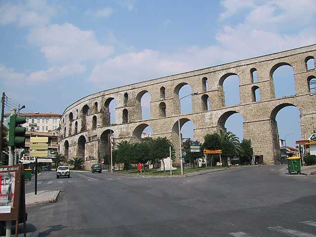 Zweistöckiger Aquädukt aus osmanischer Zeit in Kavala, Nordgriechenland